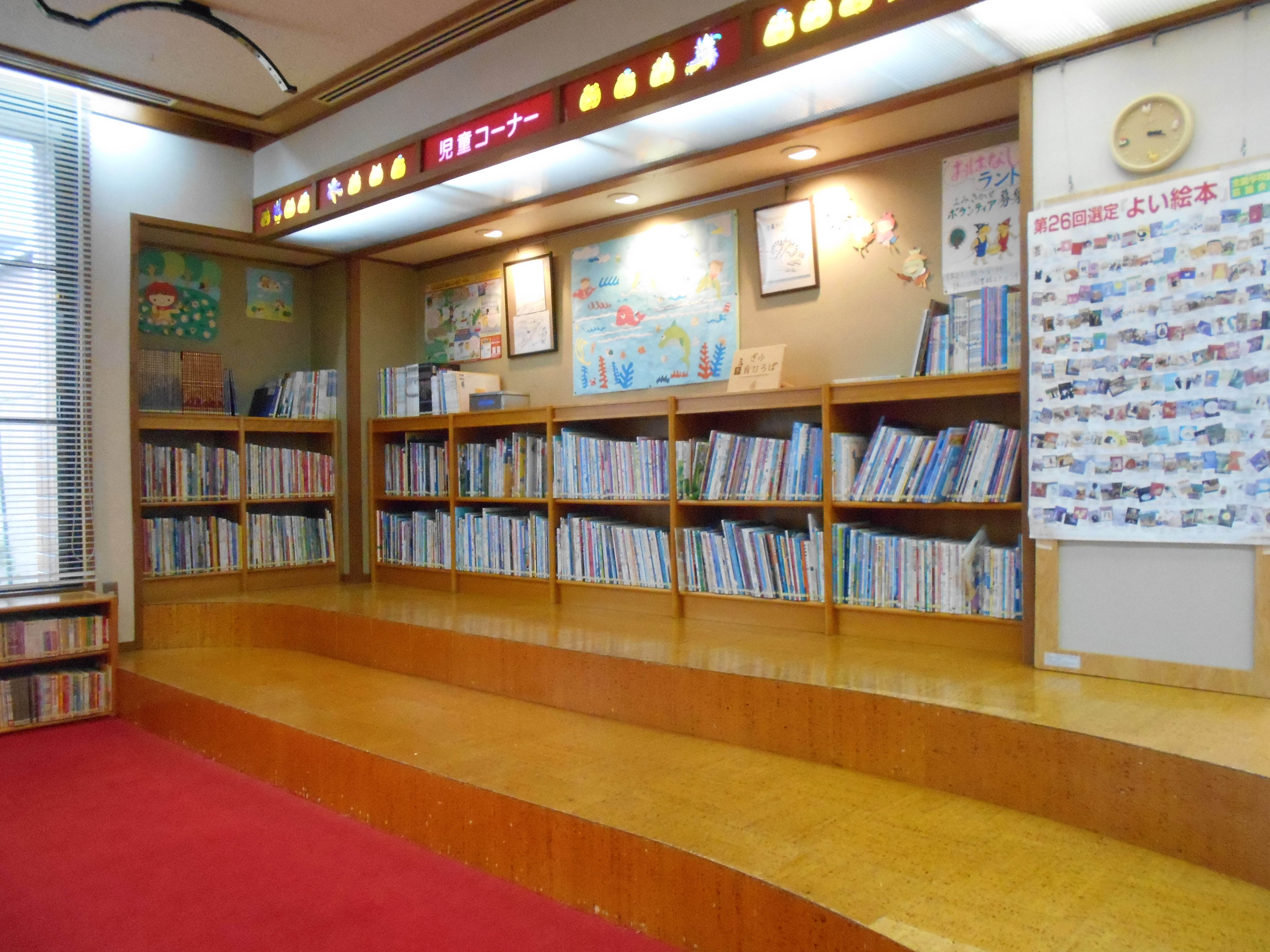 美濃加茂市中央図書館。